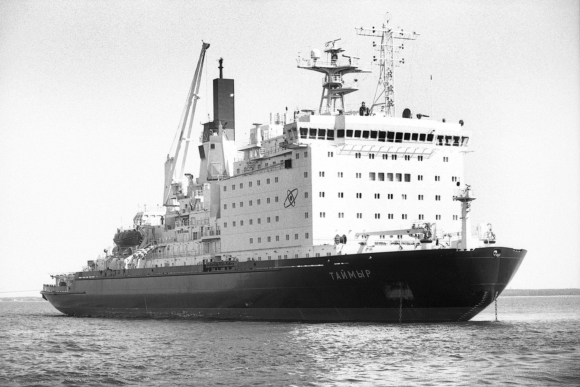 Taimõr, aatomijäämurdja Tallinna reidil 1989